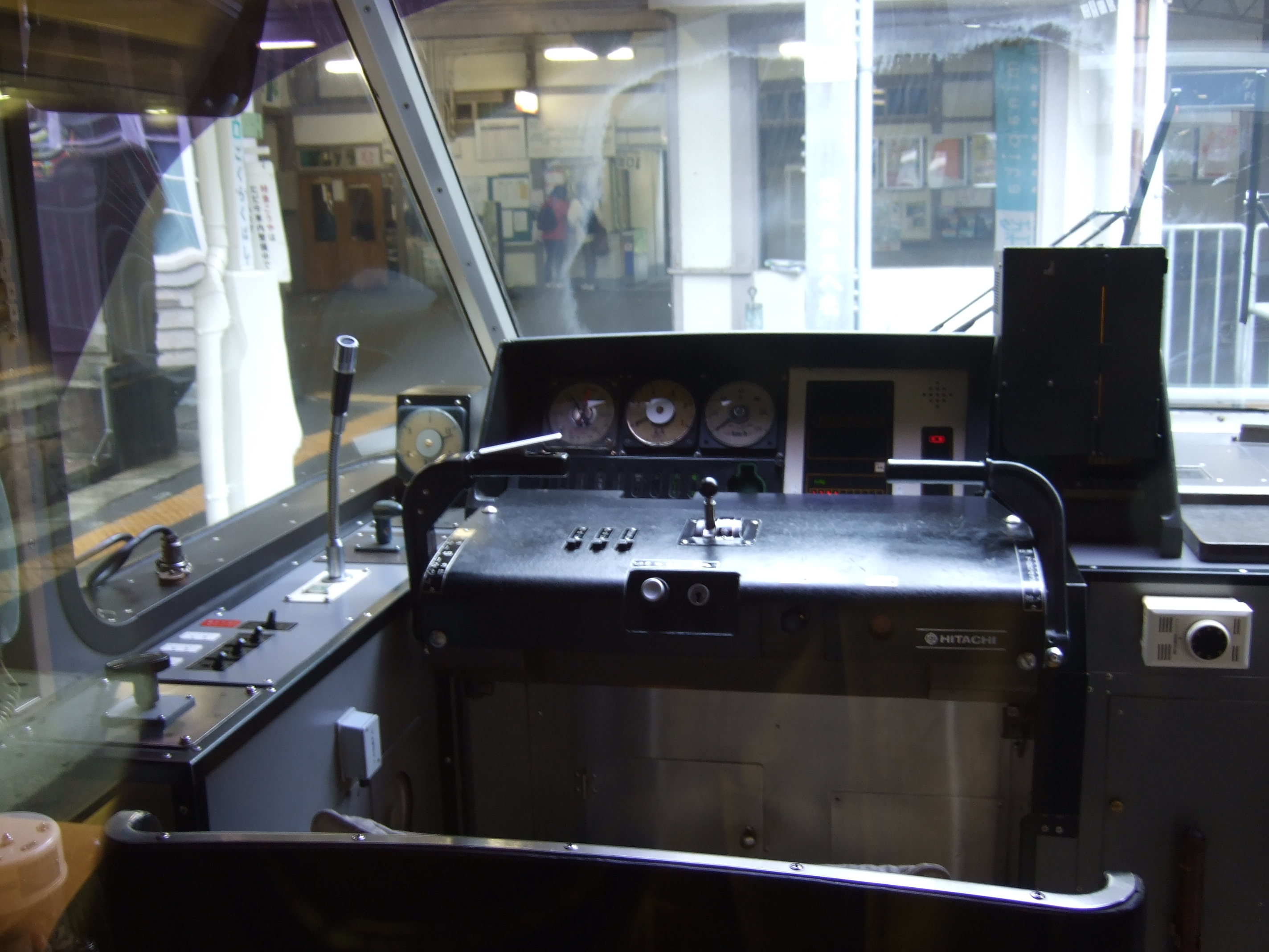 南海30000系運転台。極楽橋駅にて。